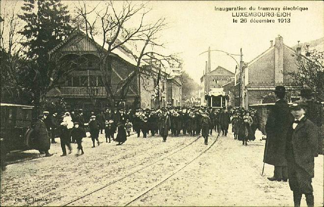 Luxembourg. Inauguration du tramway électrique Luxembourg - Eich le 26 décembre 1913.